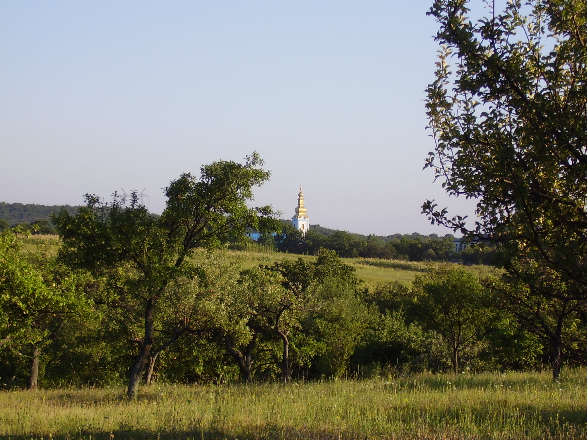 Pohled na kostel skrze políčka a meze